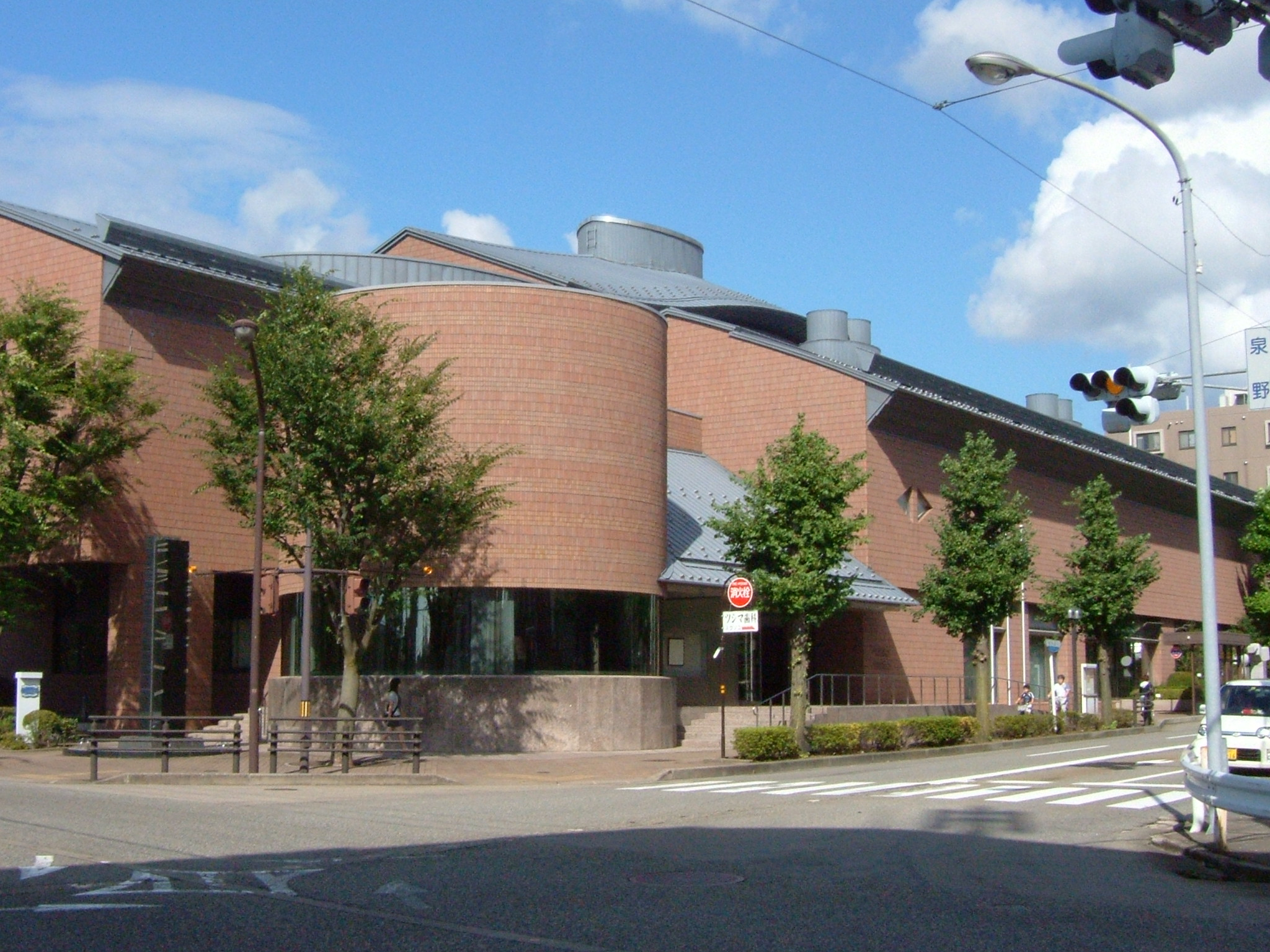 金沢市立泉野図書館